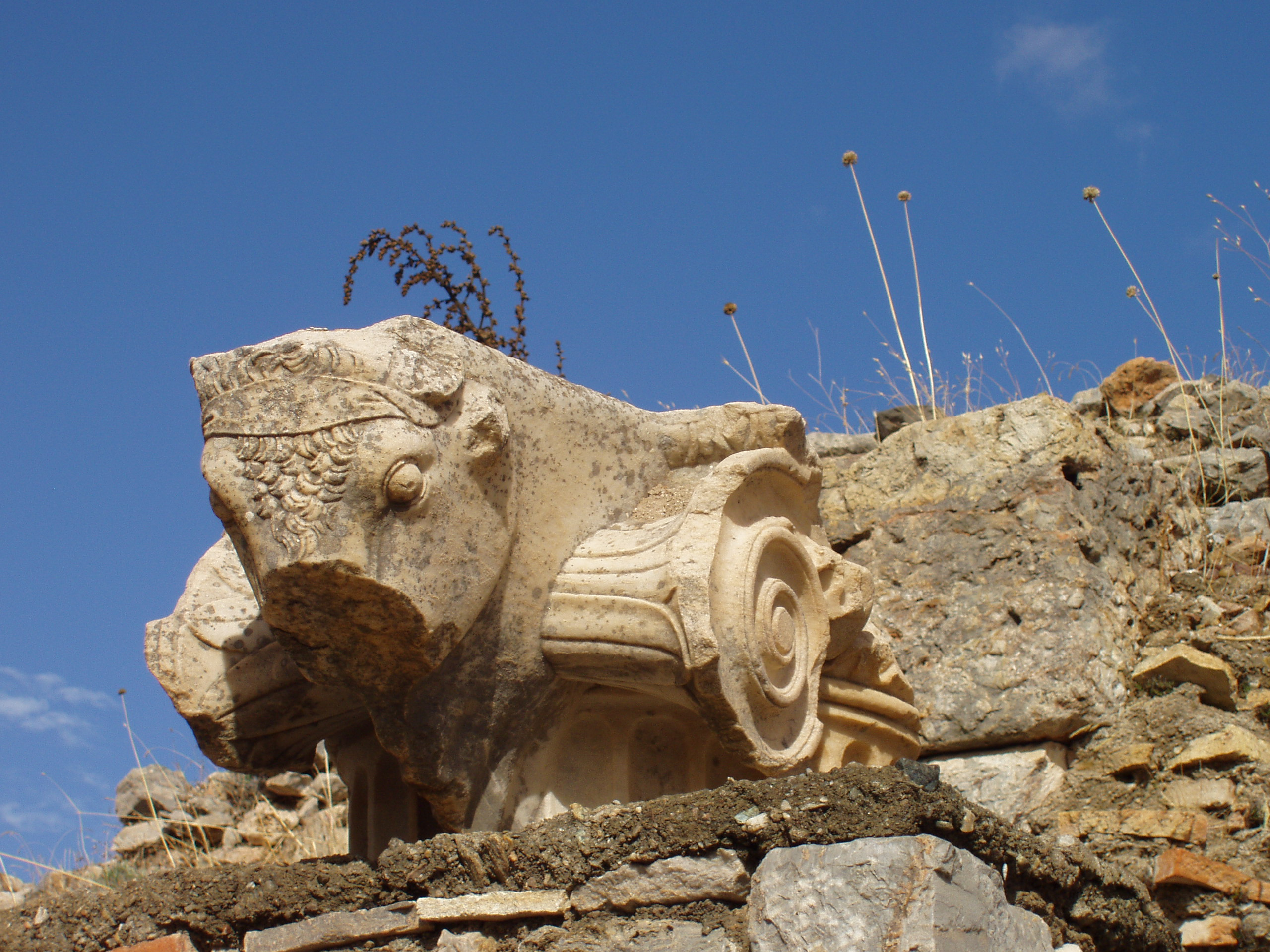 Sur ce chapiteau du site de Éphèse, l'habituel ove/testicule est remplacé par une tête de taureau, animal symbolisant la fertilité